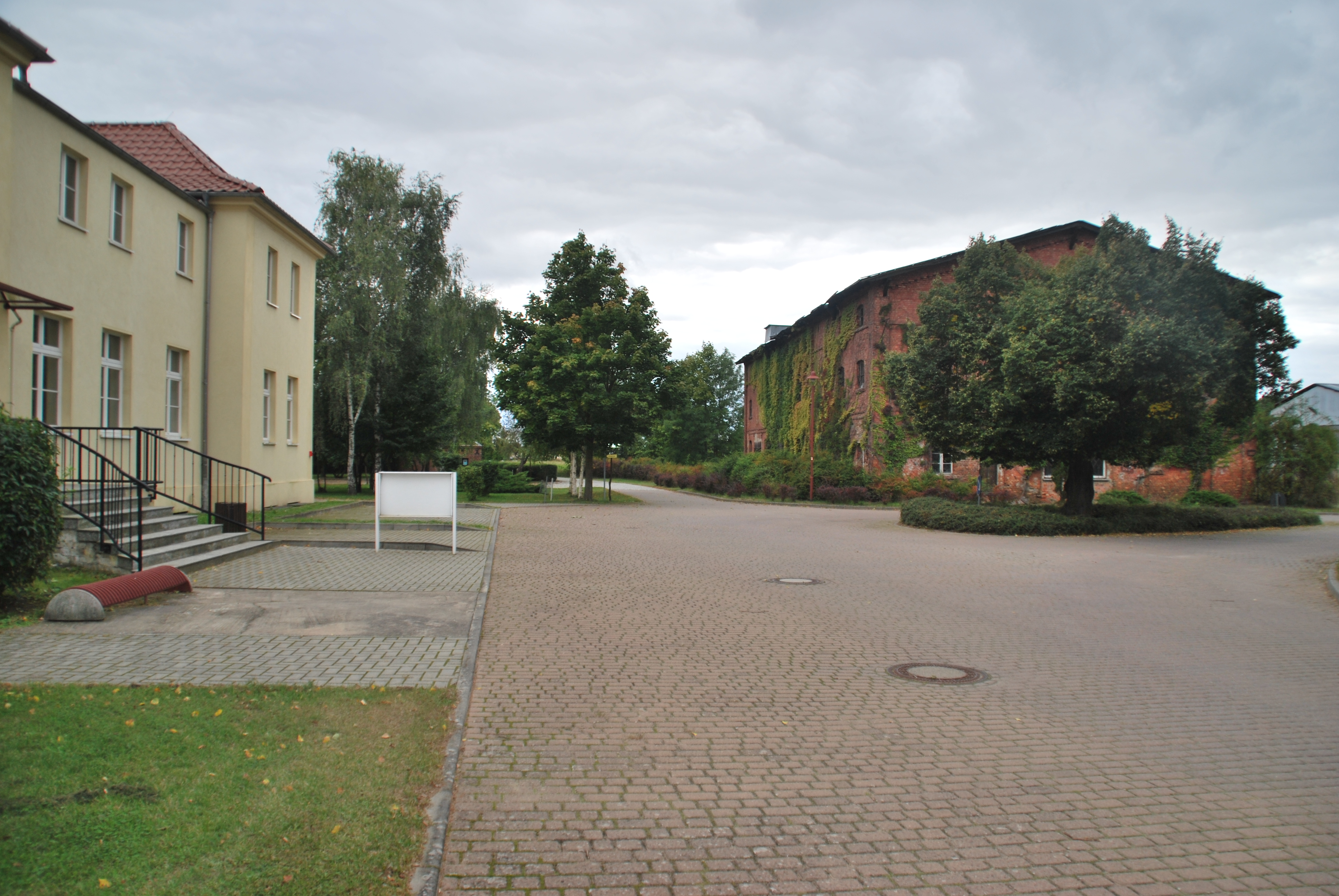 Südlicher Gutshof Rathstock mit Teilen des Herrenhauses auf der linken Seite